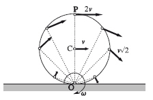 Rodadura